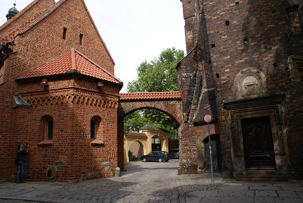 Kościół pomocniczy św. Idziego, d. kolegiata pl. Katedralny 18, Miasto Wrocław - Śródmieście